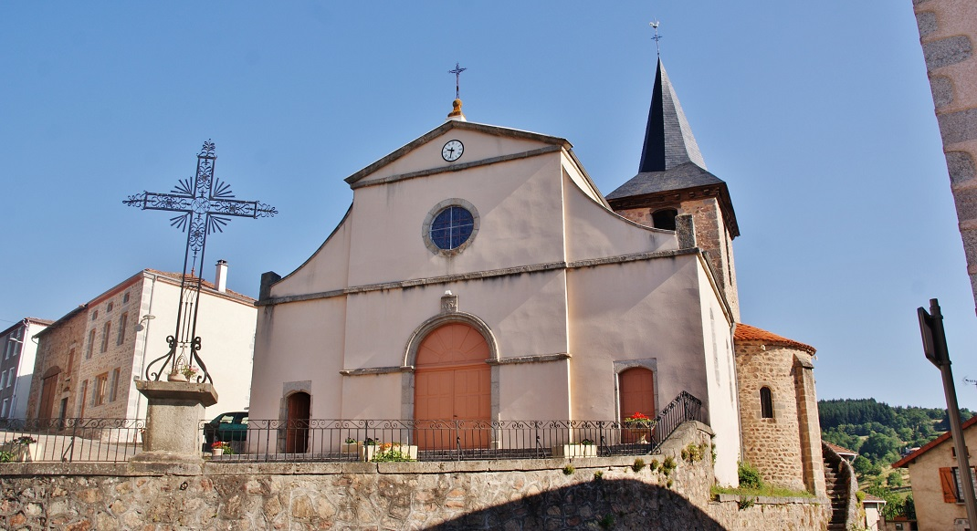 église St Bonnet